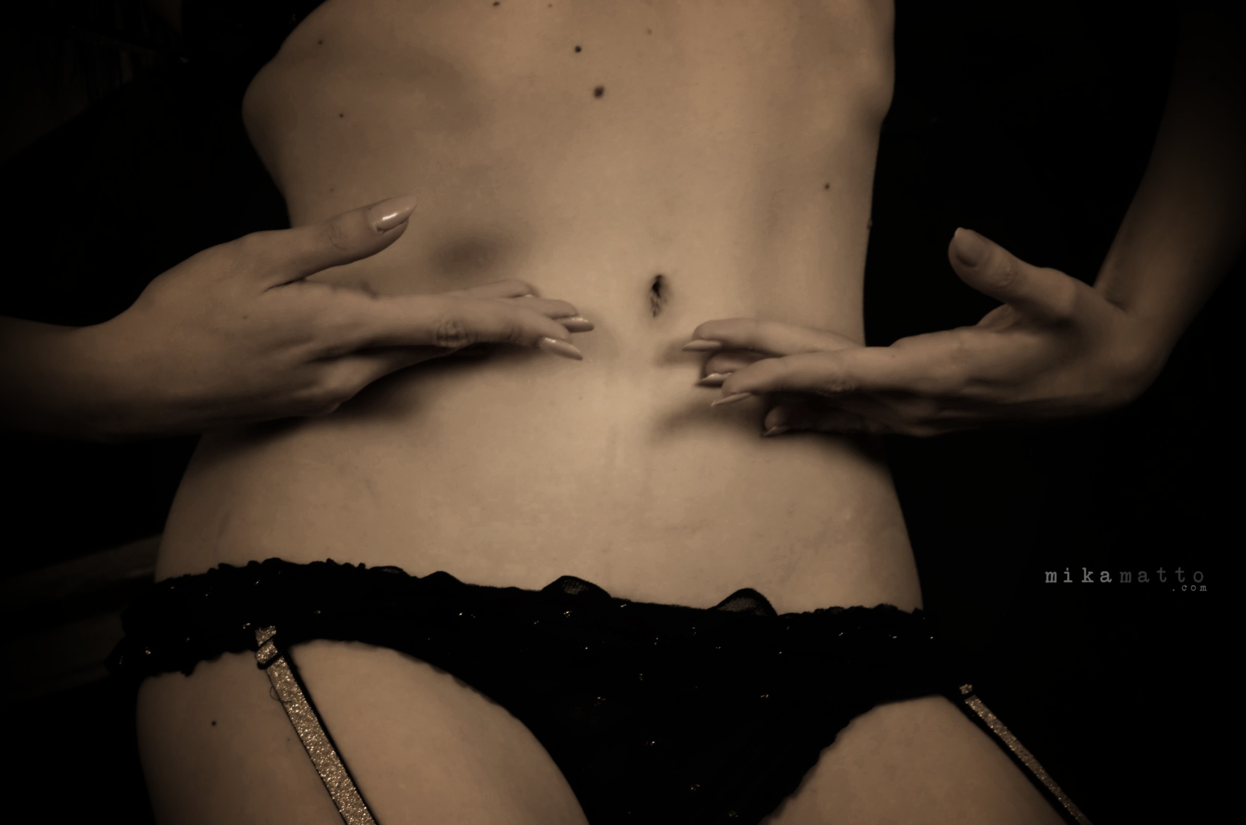 Model: Vera Raider (